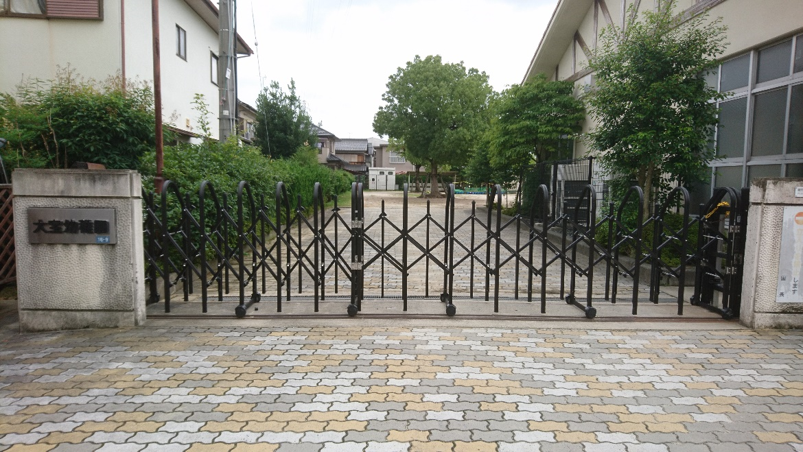 栗東市立大宝幼稚園の正門前